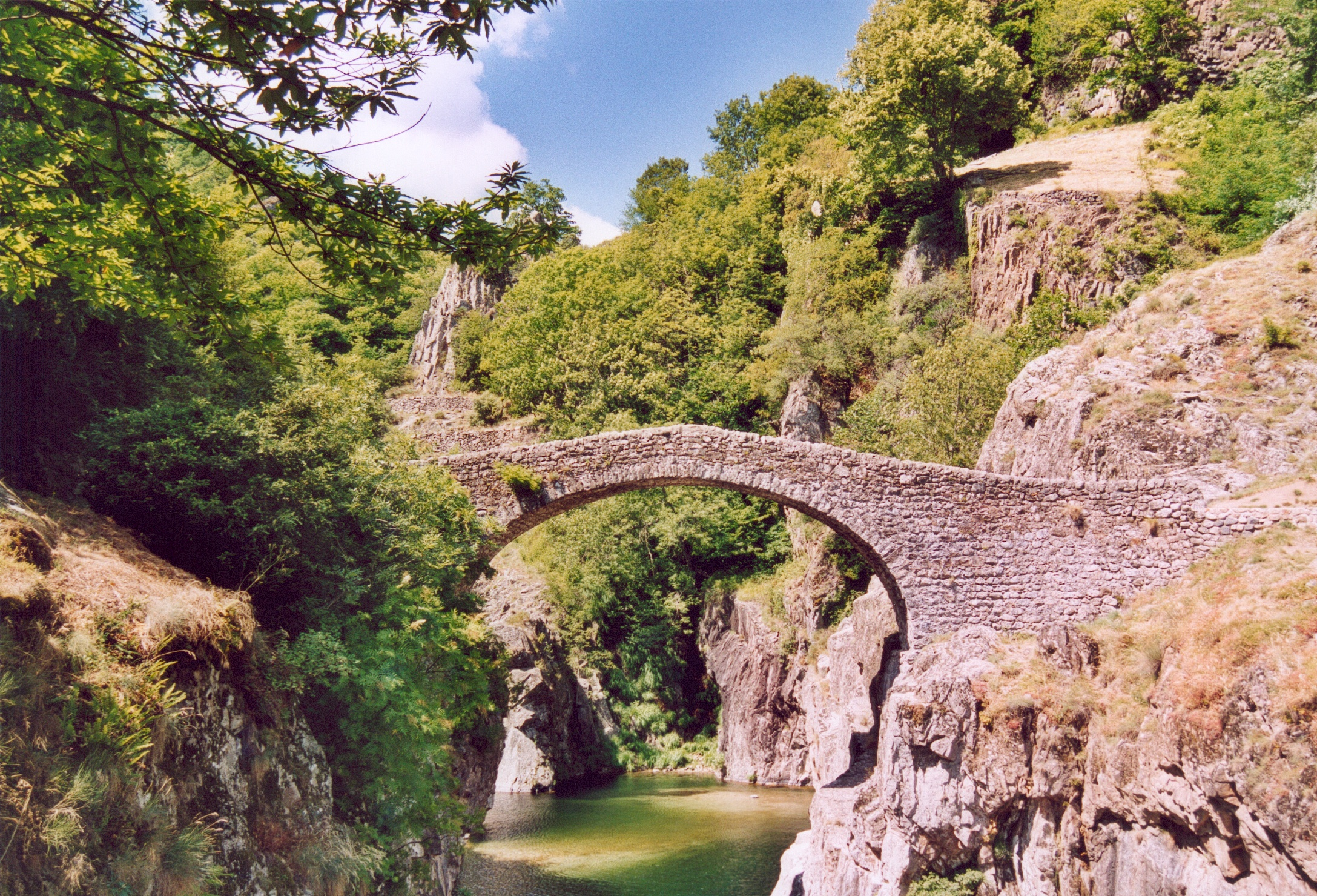 France Ardèche Thueyts Photographie prise par GIRAUD Patrick